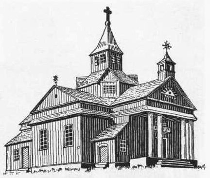 Utenos Romos katalikų bažnyčia, pastatyta 1802 m., sudegusi 1879 m.